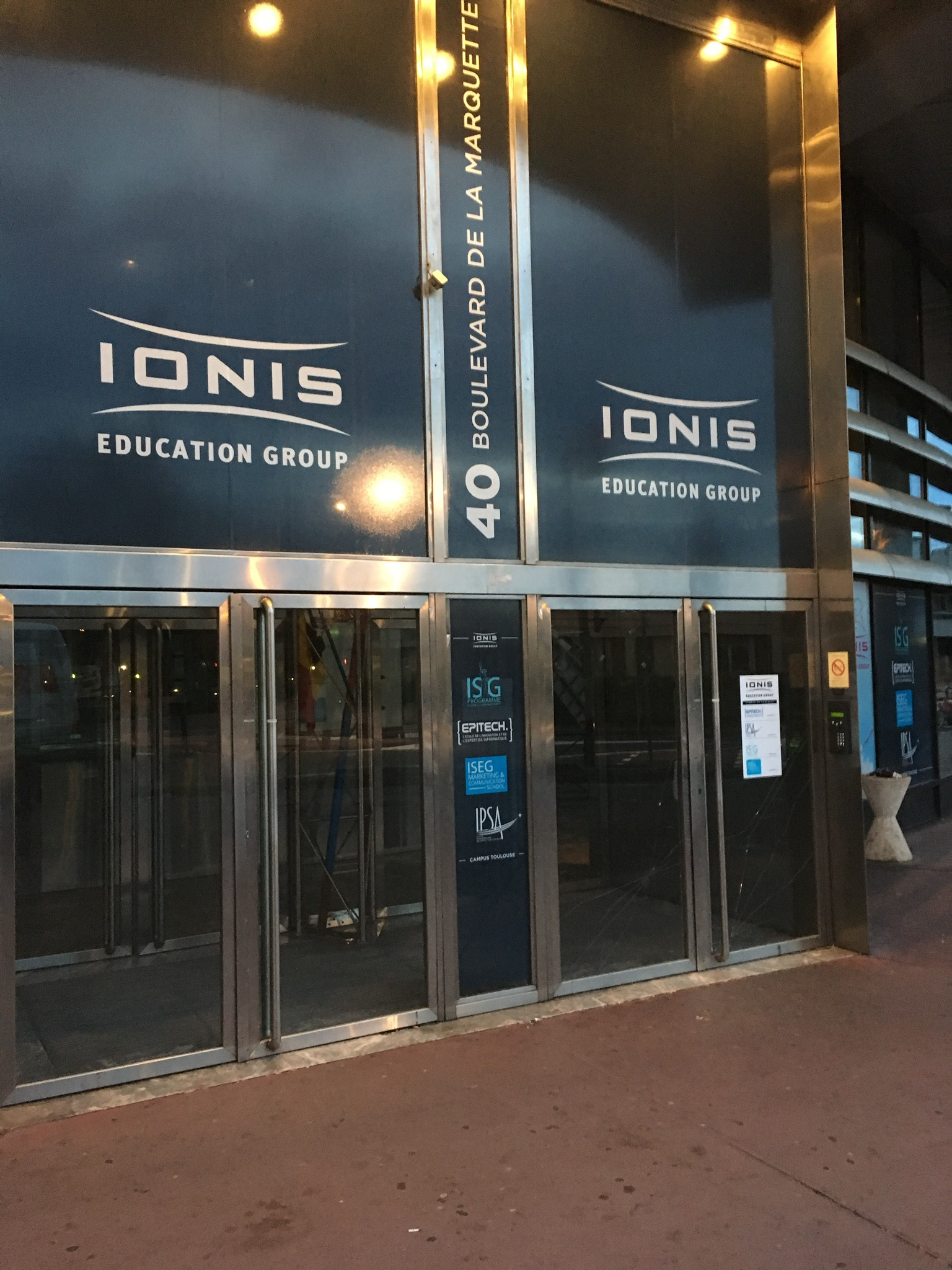 Campus toulousain de l’IPSA, école d’ingénieurs de l’air et de l’espace